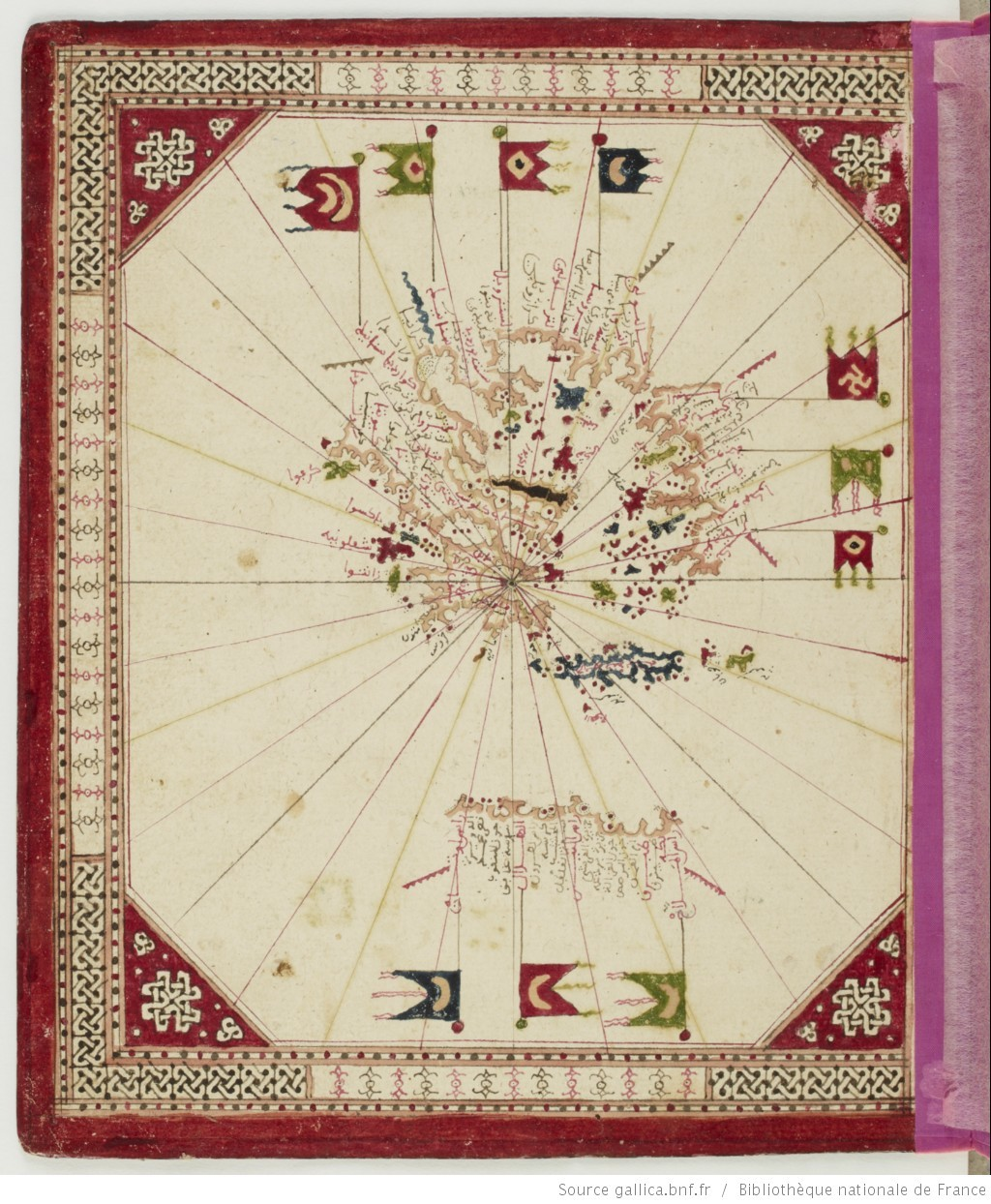 كتاب الطبلة